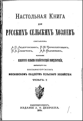 Титульный лист "Настольной книги для русских сельских хозяев" (т. 1).